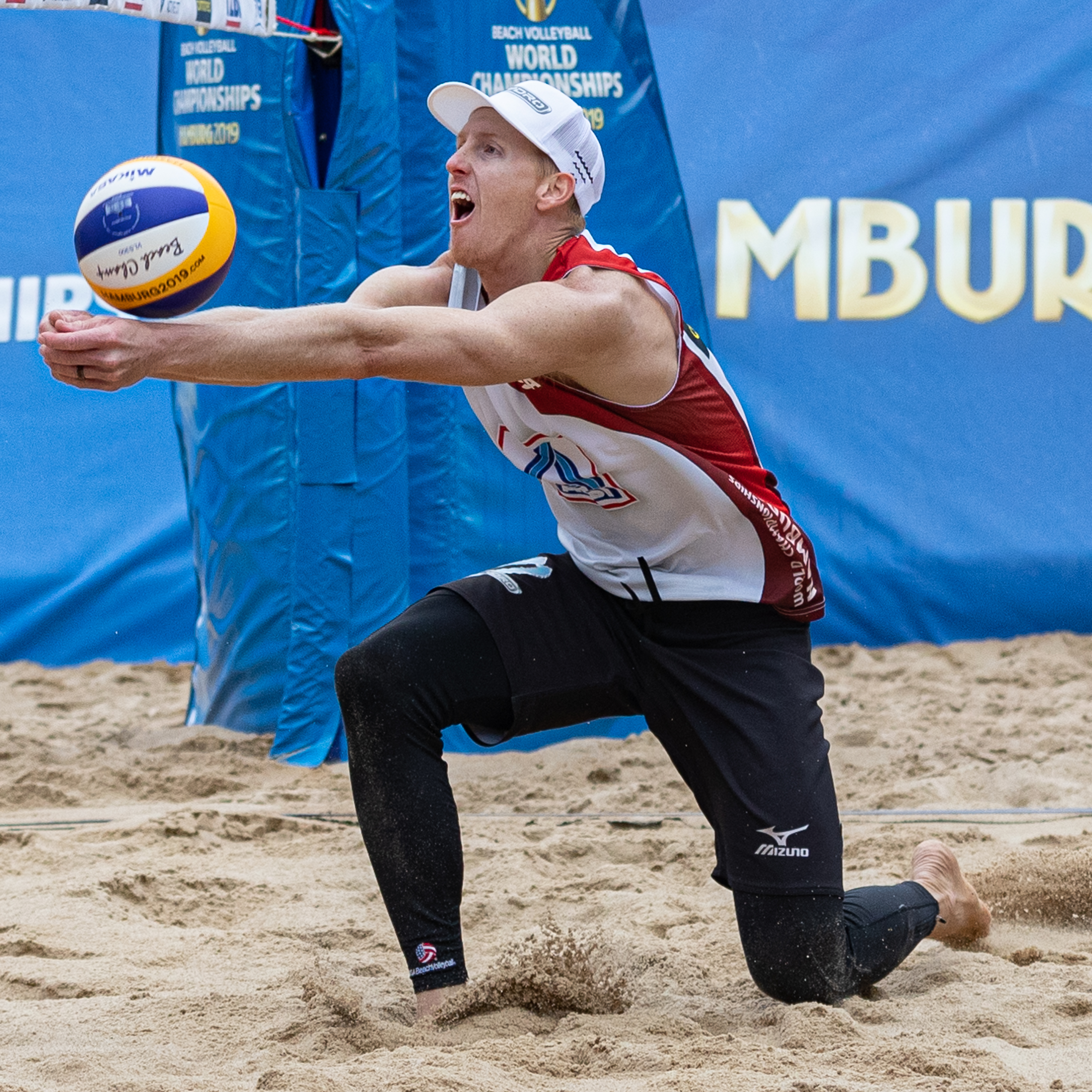 BeachVolleyball Weltmeisterschaft Hamburg 2019; Tri Bourne (USA)